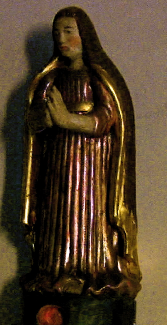 Statuette de Marie Madeleine (16ème siècle) Pomayrols Aveyron France. Cette statuette décorait l'intérieur de l'église de la Fage. Sa restauration fut financée par le conseil général et l'amicale "L'union Pomayrolaise" Une copie a été placée dans l'église de Pomayrols.